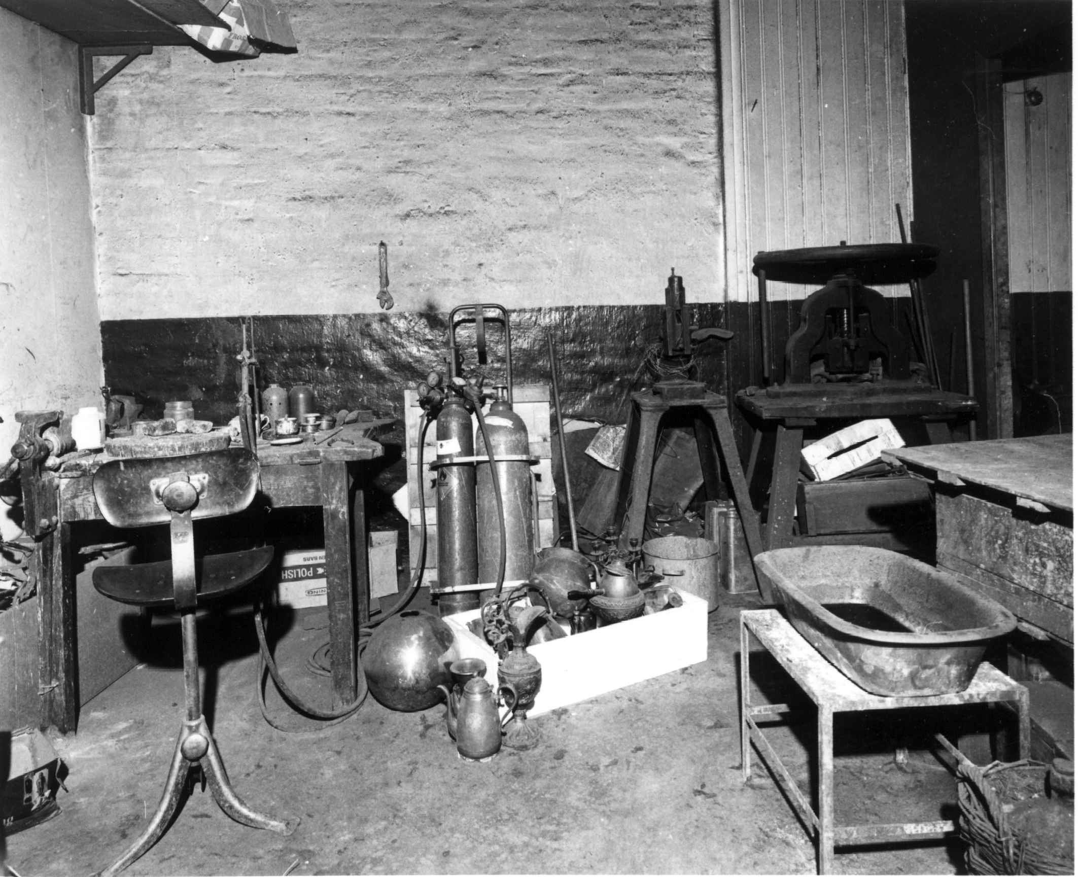 C. P. Larsens gjørtlerverksted i Vahls gate 3, Oslo. Verkstedet ble avviklet i 1986. Bildet er fra en serie fotografier fra C.P. Larsens gjørtlerverksted i Vahlsgt. 3, Oslo. Firmaet ble etablert i 1857 og avviklet i 1986. Det flyttet inn i lokalene i Vahlsgt. 3 i 1959. Det meste av utstyr og inventar er overtatt av Norsk Folkemuseum. Lokalene ble oppmålt av museet i juli/september 1987.